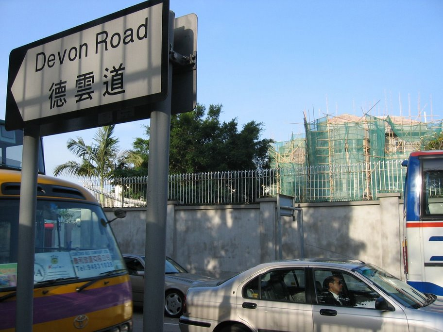 香港德雲道 Devon Road, Hong Kong